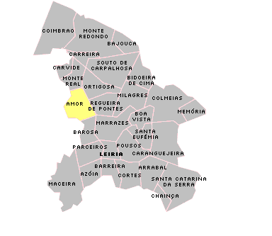 Localisation de LRA-Amor.PNG sur la freguesia de Leiria.